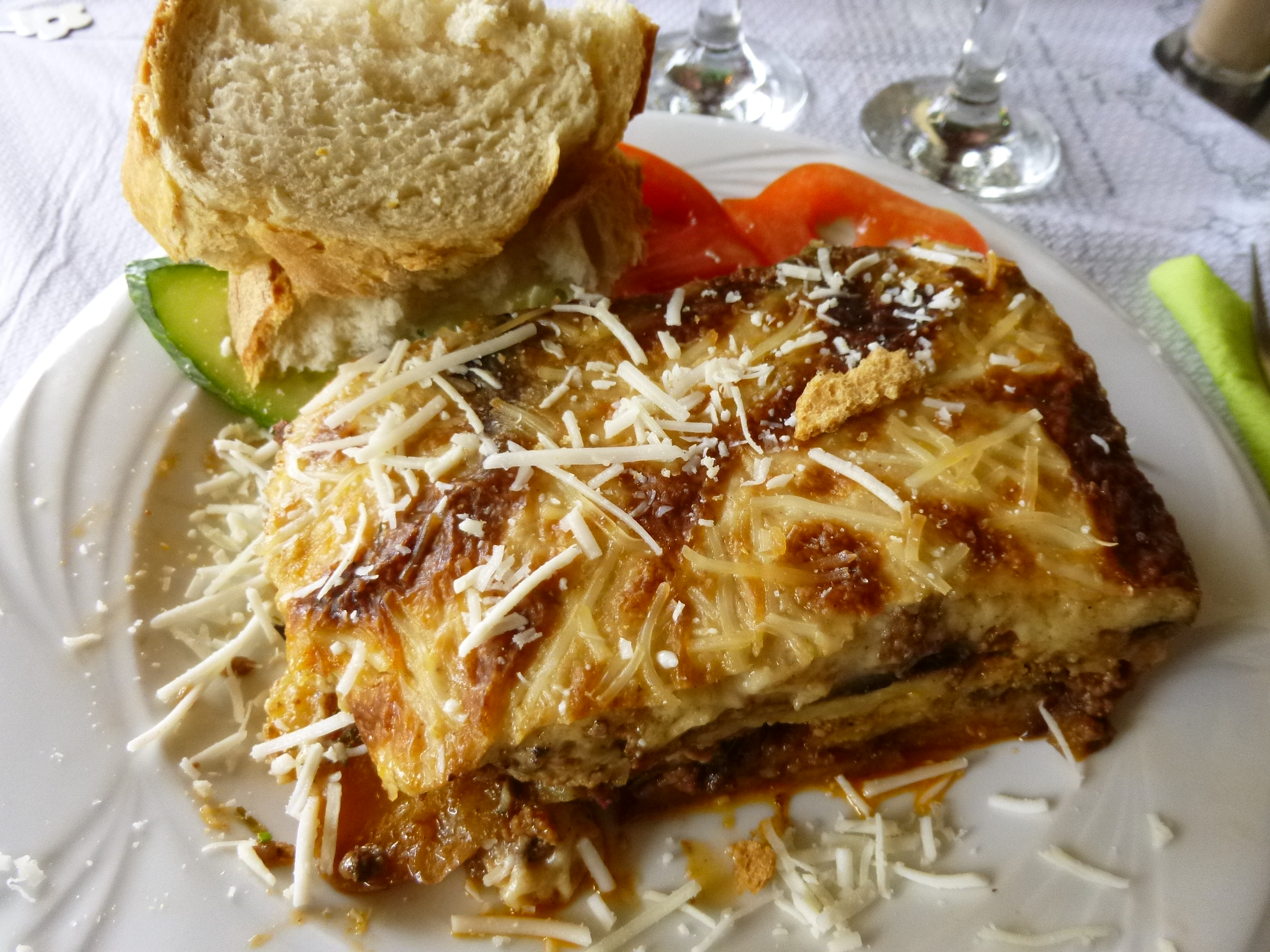 Moussaka ist ein typisches griechisches Gericht, das aus Kartoffeln, Hackfleischsoße und Bechamelsoße zubereitet wird.